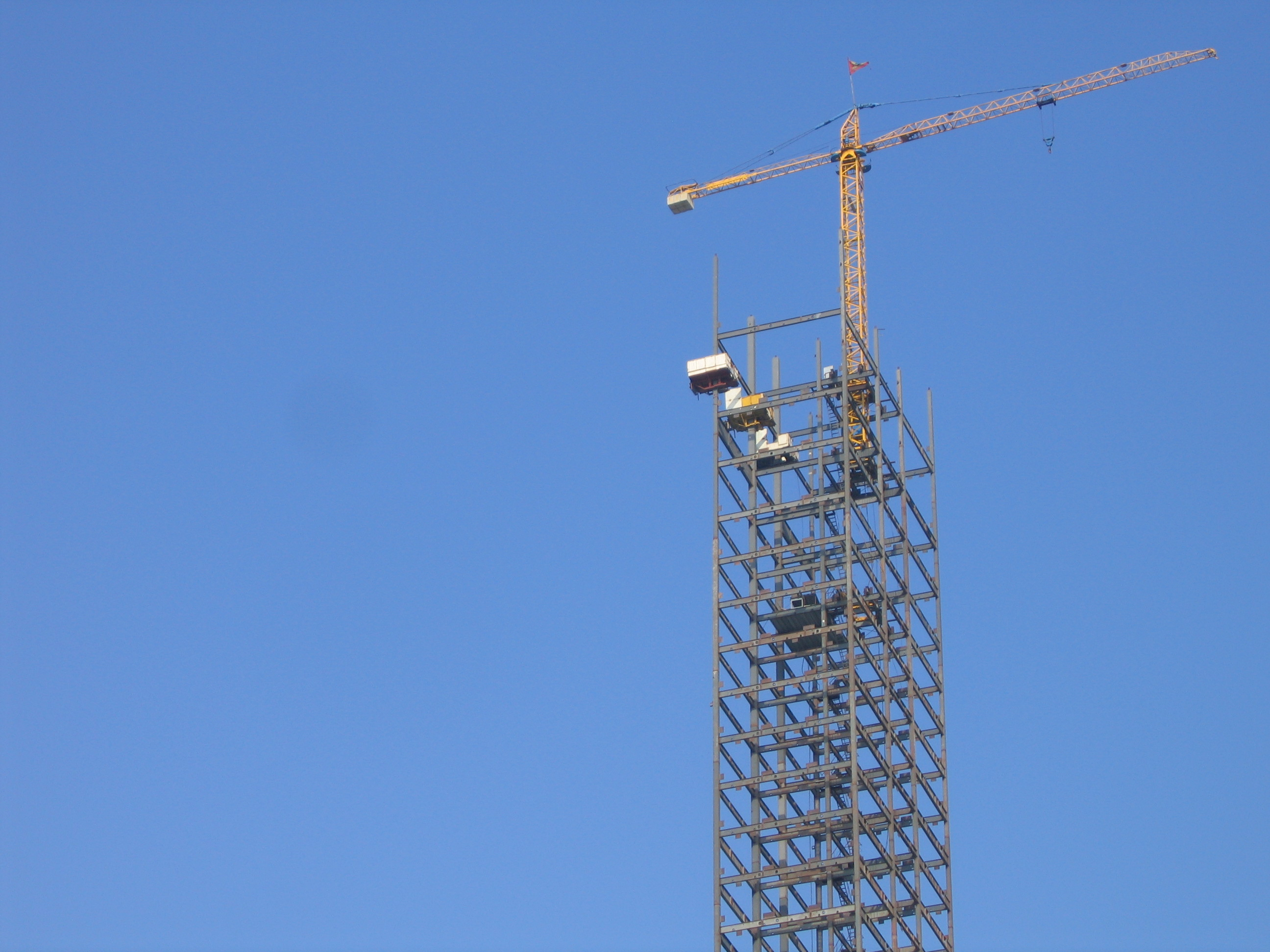 Con esta grua se armo y desarmo la escollera. Se movian elemento hasta de 4 Ton, llegando hasta los 190 m de altura